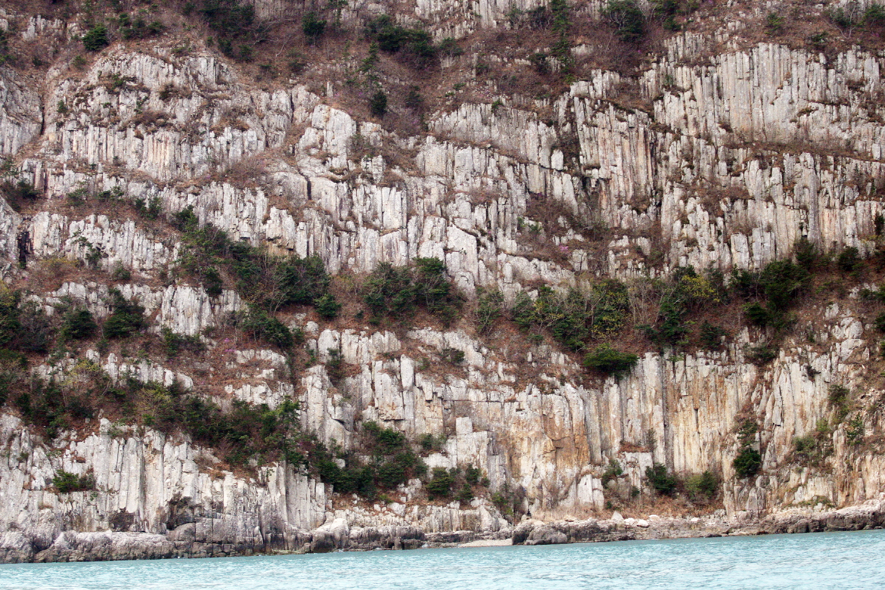 완도의 금당8경중 하나인 병풍바위